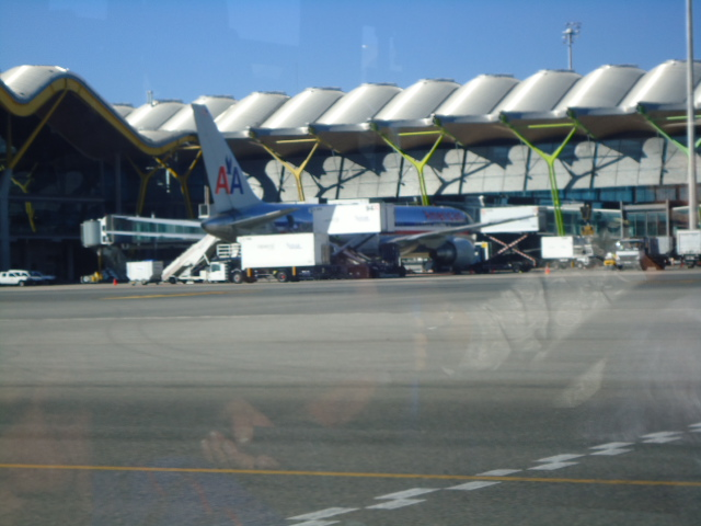 Boeing 767 de American Airlines en el Aeropuerto de Madrid-Barajas